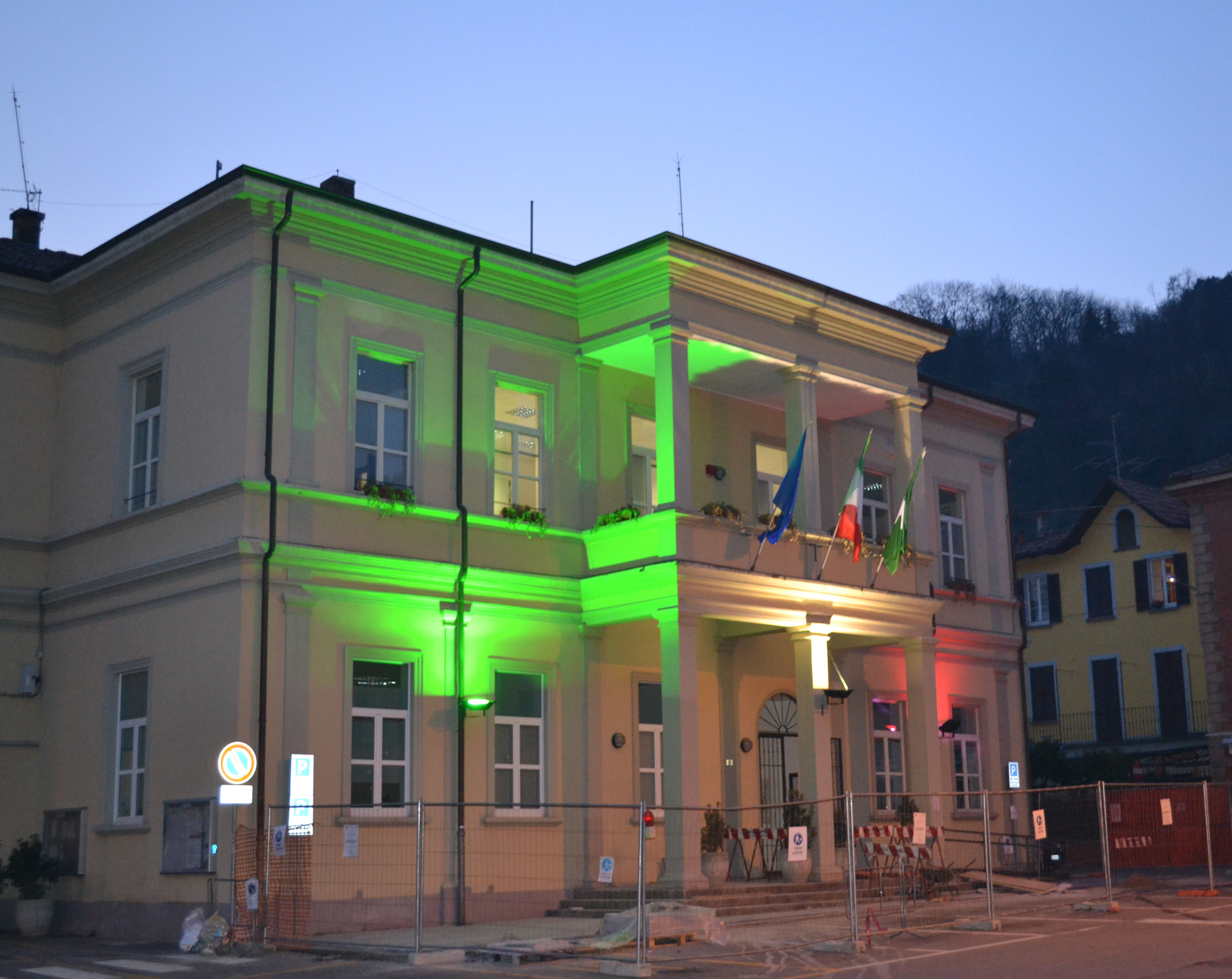 by Mark alba